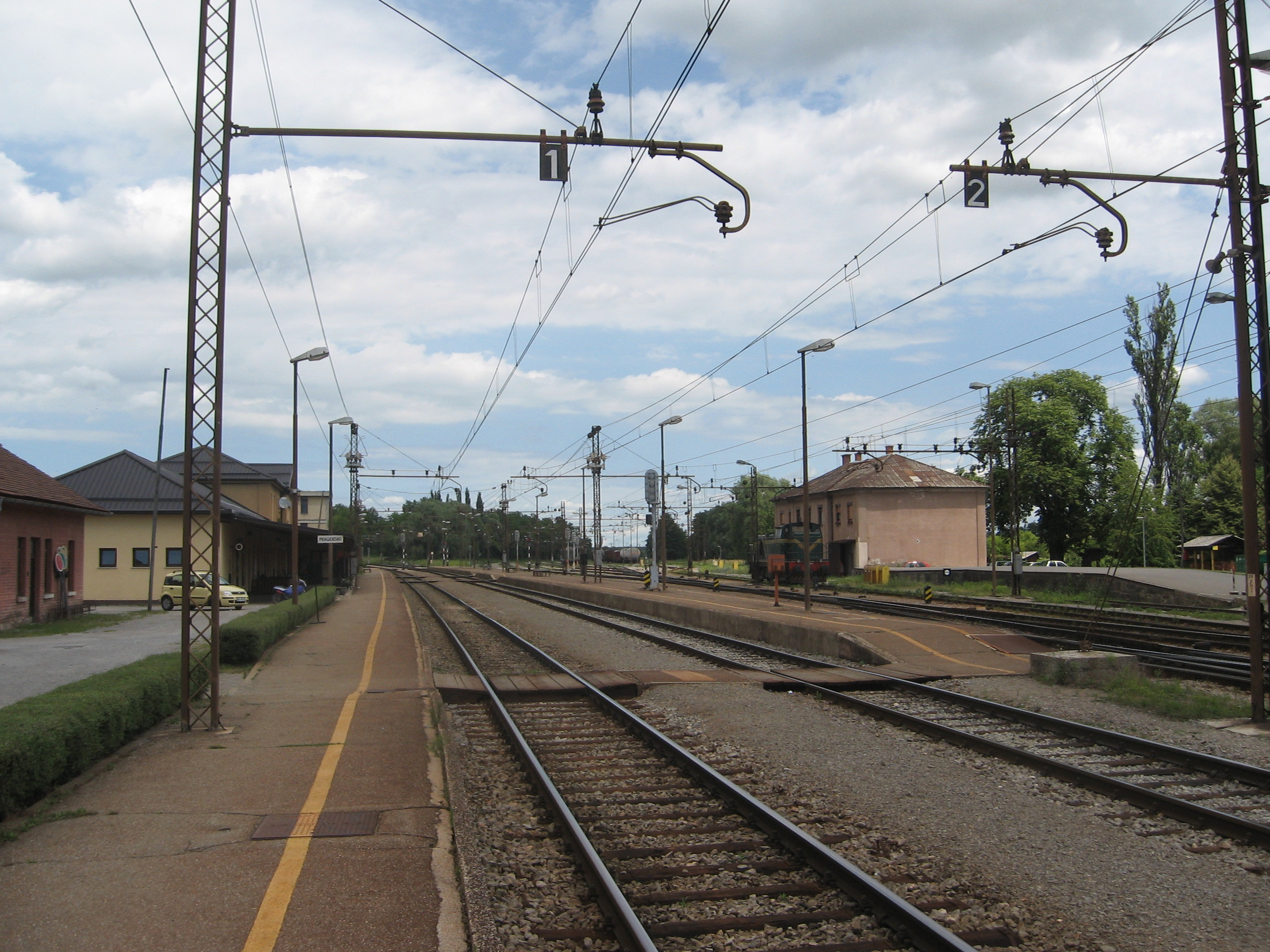 Železniška postaja Pragersko